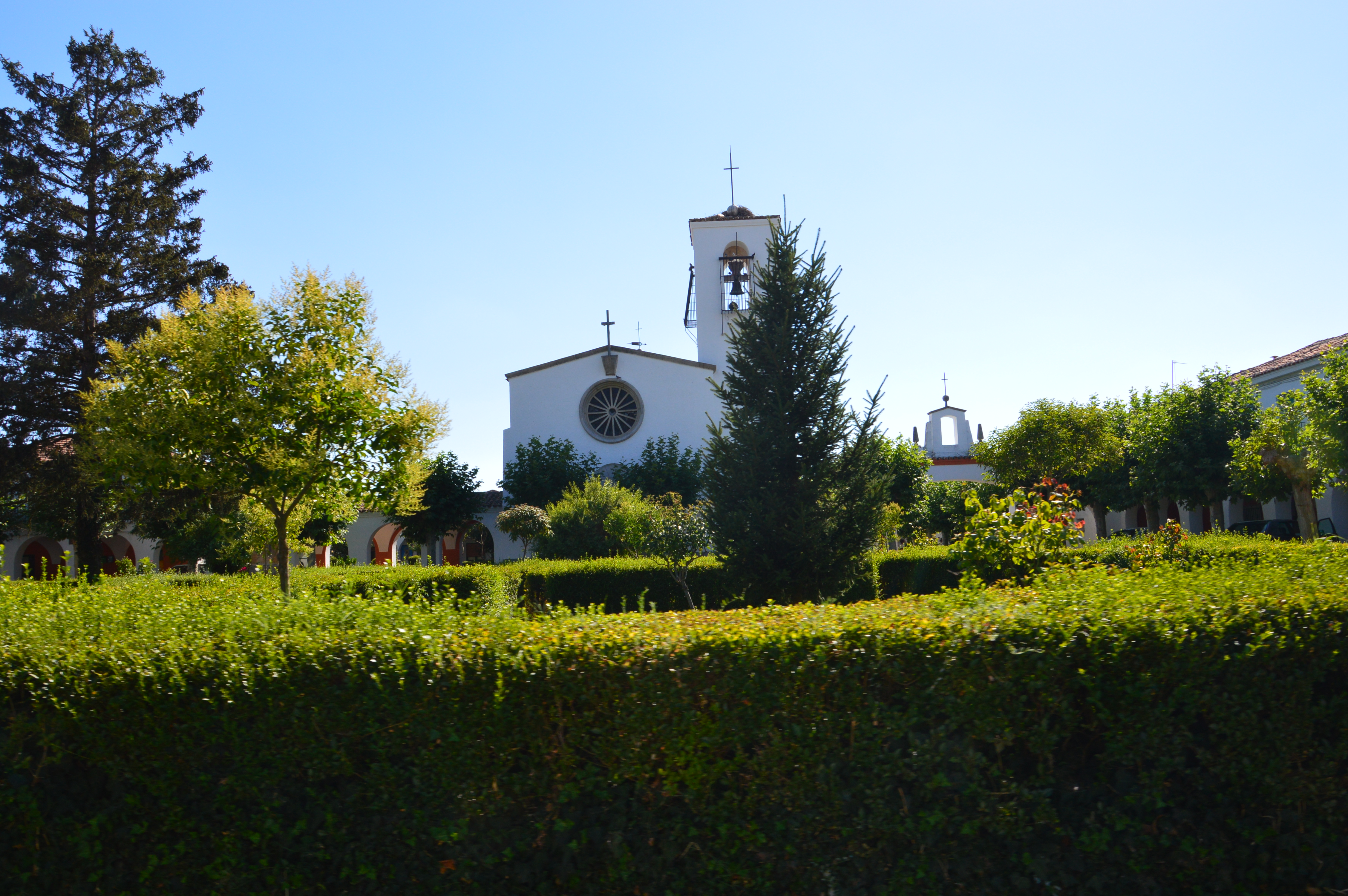 Plaza e iglesia de Águeda